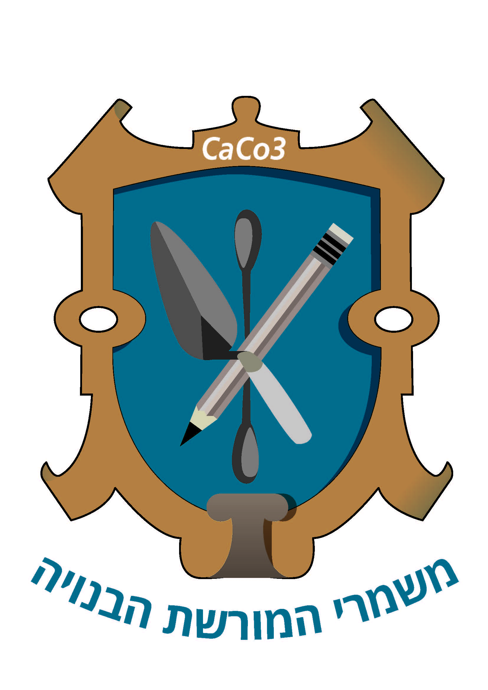 לוגו משמרי המורשת הבנויה. הלוגו מציין את התאגדות משמרי המורשת הבנויה בדומה לגילדות אנשי המקצוע בימי הבניים, ועל הסמל מוצבים כף בנאים, ספטולה איטלקית ועיפרון בהם מכלי העבודה של המשמר. כמו כן הנוסחה CaCo3 שהיא מיינצ את חומרי המליטה בשימור על בסיס סיד.